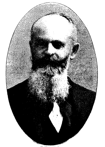 Felix Kohn, Vizepräsident des Zentralverbandes der Industriellen Österreichs, in der Wiener Zeitung